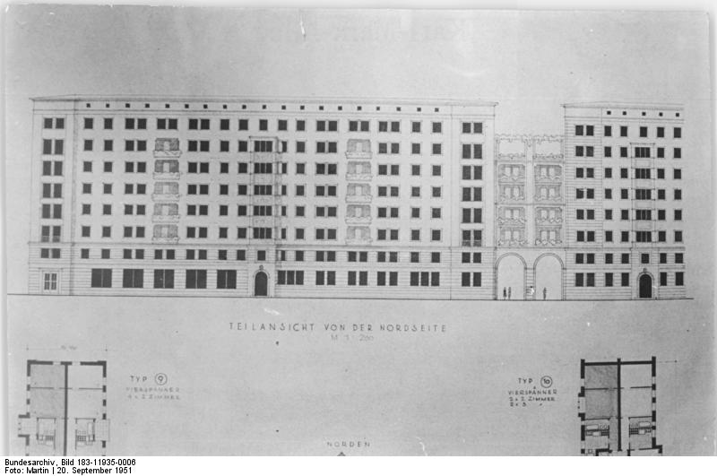 Illus Martin 20.9.1951 Entwürfe zur Neugestaltung Berlins. Zur Neugestaltung der Karl-Marx-Allee in Berlin veranstaltete der demokratische Magistrat ein Preisausschreiben für Architekten. UBz: 1. Preis. Architekt Egon Hartmann, Weimar Fassade.